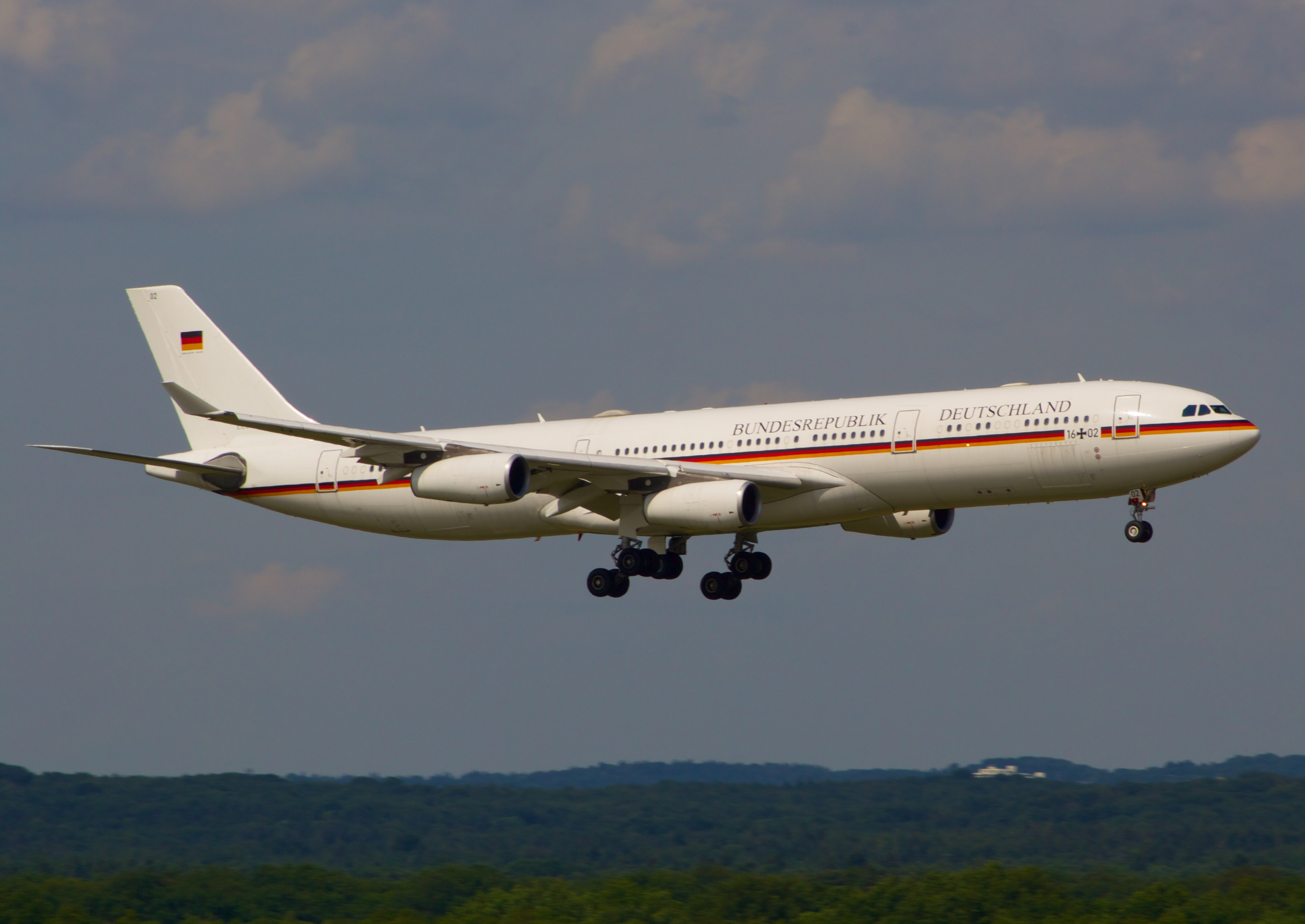 Flugzeug der Bundesrepublik Deutschland, Kennung 16+02, landet am Köln/Bonn Airport.